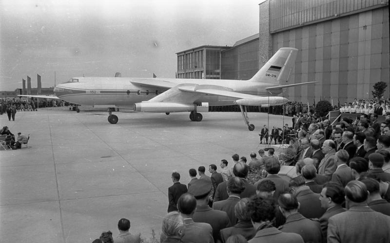 Flugzeugwerk Dresden, Flugzeug 152 Zentralbild/Loewe 1.5.1958 Walter Ulbricht auf der Kundgebung bei den Dresdner Flugzeugbauern Unter den festlichen Klängen eines Orchesters und dem Jubel vieler tausend Arbeiter, Ingenieure und Angestellter der volkseigenen Luftfahrtindustrie öffnete sich am 30.4.1958 das riesige Tor der Montagehalle der Flugzeugwerke Dresden, aus der sich der silberne Leib des hallenfertigen Strahlturbinenverkehrsflugzeuges "152" heraus bewegte. In Gegenwart des 1. Sekretärs des ZK der SED Walter Ulbricht, teilte der Direktor der Flugzeugwerke, Rentsch, den Teilnehmern der Kundgebung mit, das damit der gestellte Kampftermin zur Fertigstellung dieser Maschine erfüllt worden ist. U.B.z.: Walter Ulbricht während seiner Ausführungen. [Dresden.- Roll-out des Turbinenstrahl-Passagierflugzeuges "152/I V-1"] Abgebildete Personen: Ulbricht, Walter: Staatsratsvorsitzender, Erster Sekretär des Zentralkomitees (ZK) der SED, Vorsitzender des Nationalen Verteidigungsrates, DDR